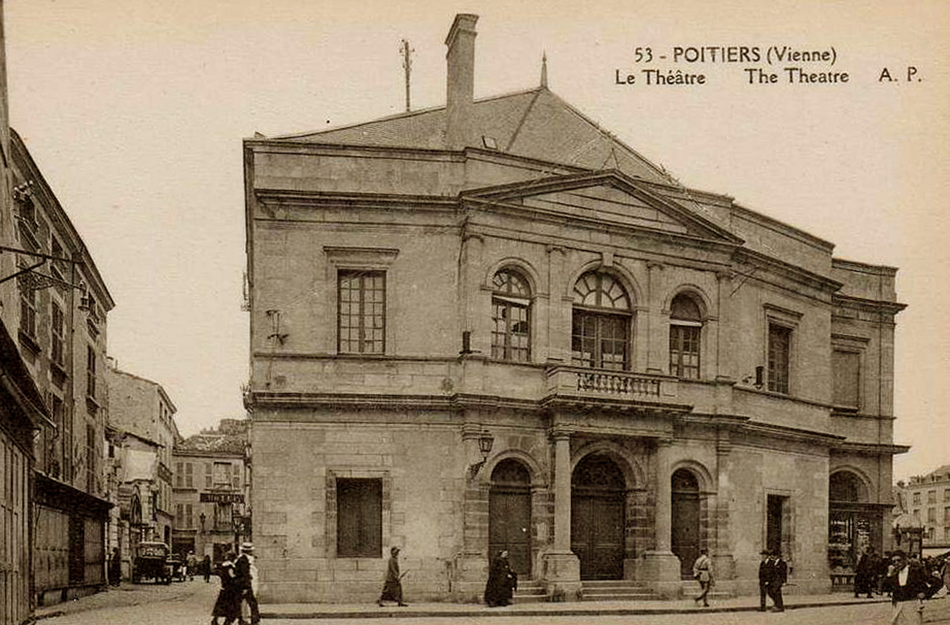 carte postale ancienne, ancien théatre municpial de Poitiers